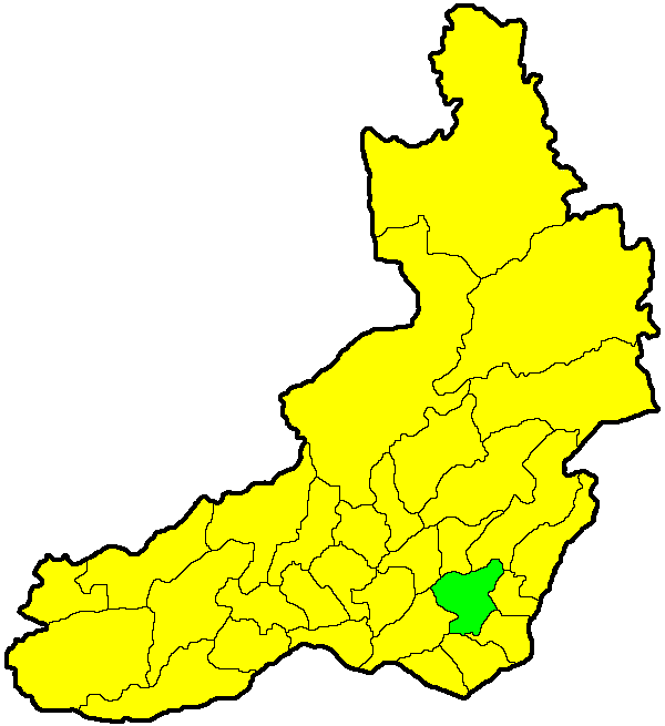 Александрово-Заводский район на карте Забайкальского края